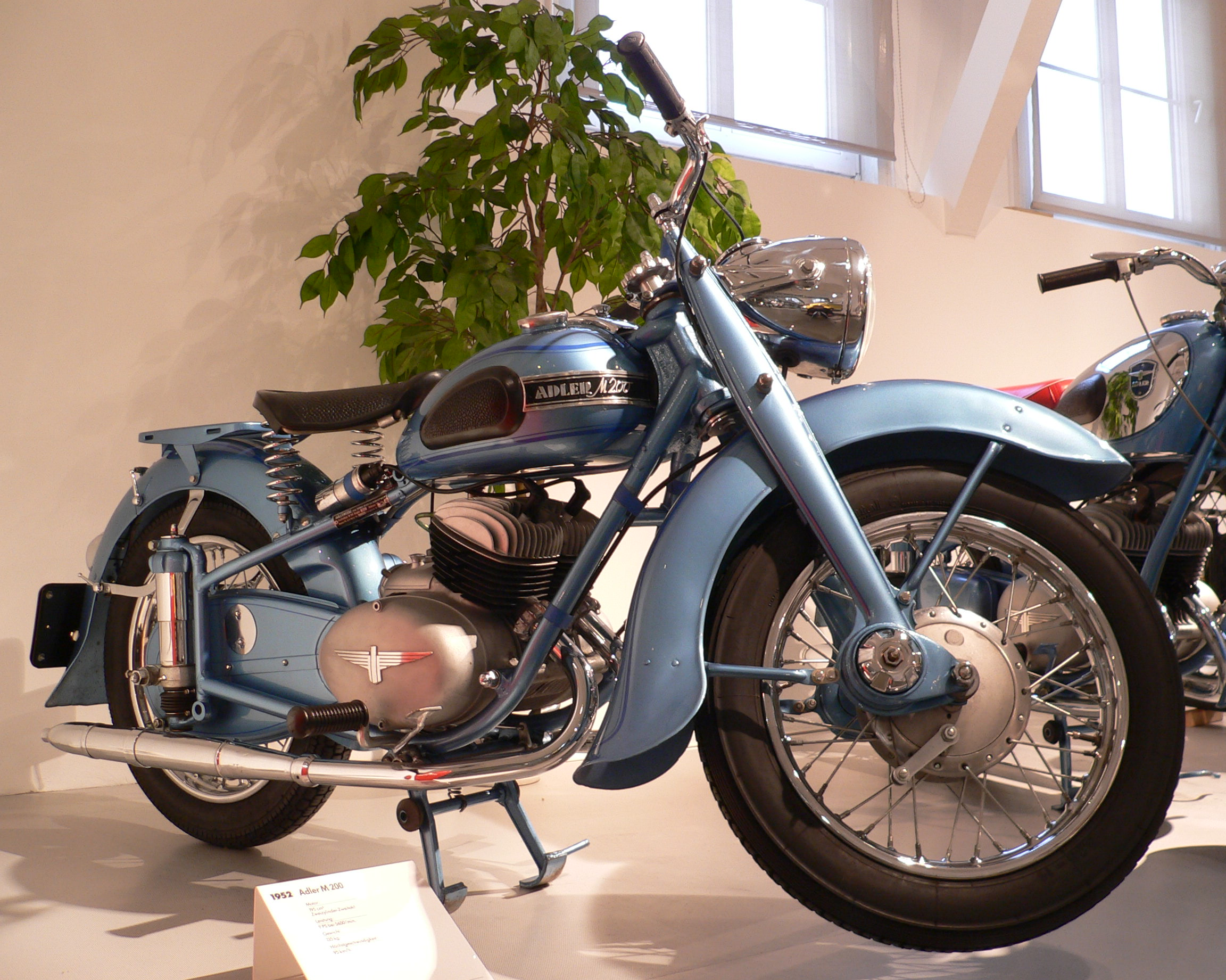 Motorbike "Adler M 200" (1952) at the Deutsches Zweirad- und NSU-Museum (195 cm³, 9 PS bei 5.600 U/min., 95 km/h)